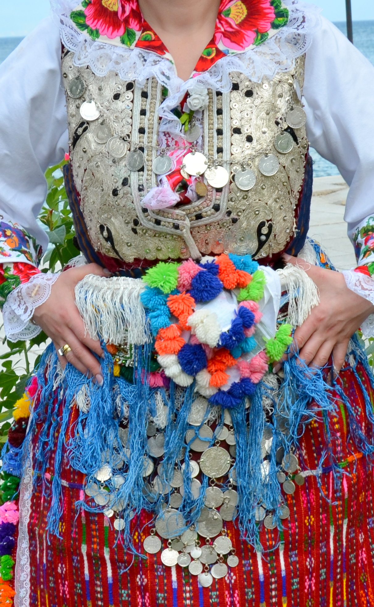 Народните носии во Македонија имаат вековна традиција. Тие се дел од материјалната култура на македонскиот народ и претставуваат значајна гранка од народното уметничко творештво. Создавани како колективна придобивка на сиот македонски народ, тие во долга низа години се пренесувале од поколение на поколение и во својот развоен пат во себе вклопиле многу елементи од разните културни влијанија што се вкрстувале на овој дел од Балканот.